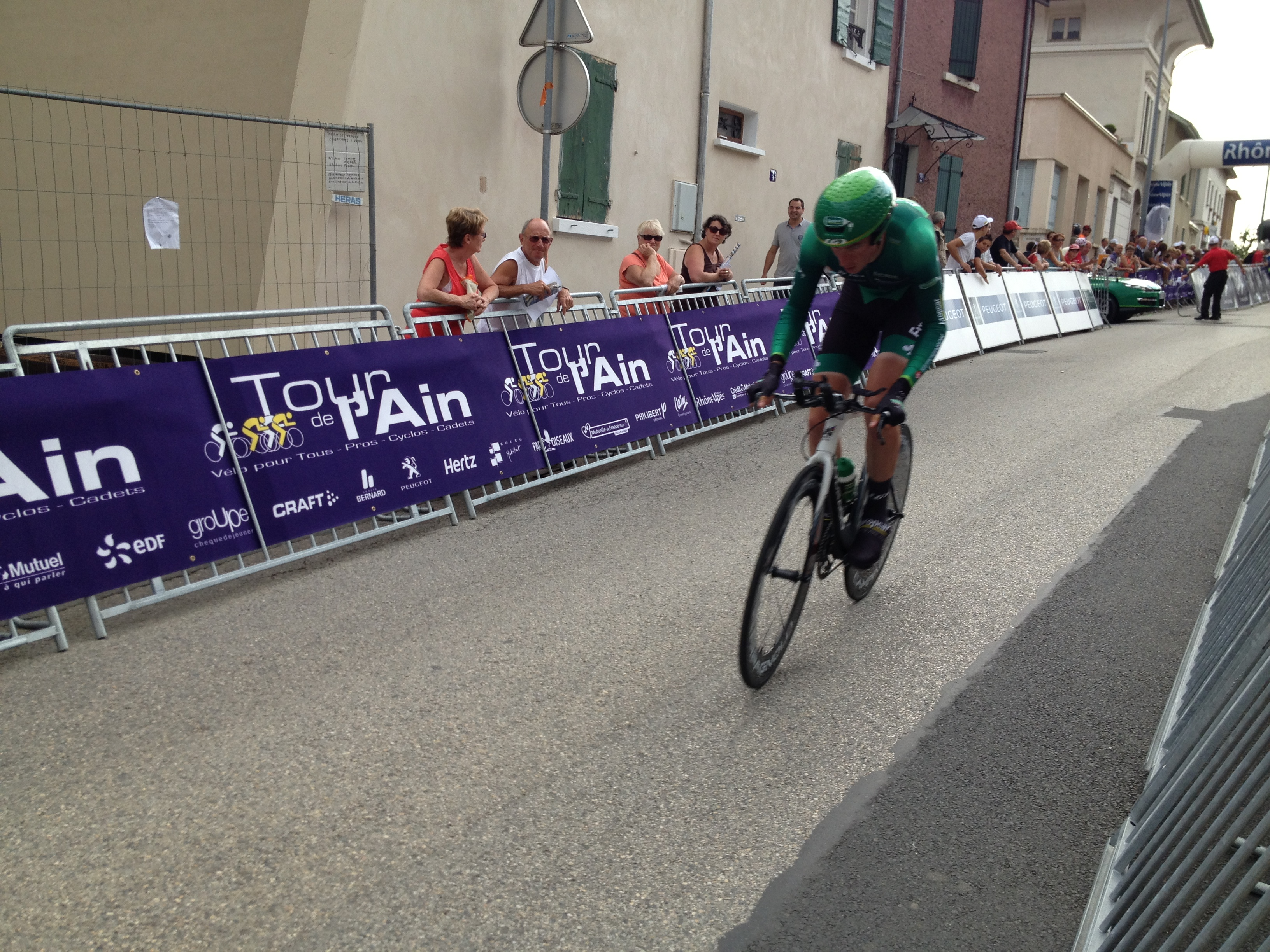 Coureur effectuant le prologue du Tour de l'Ain 2013.